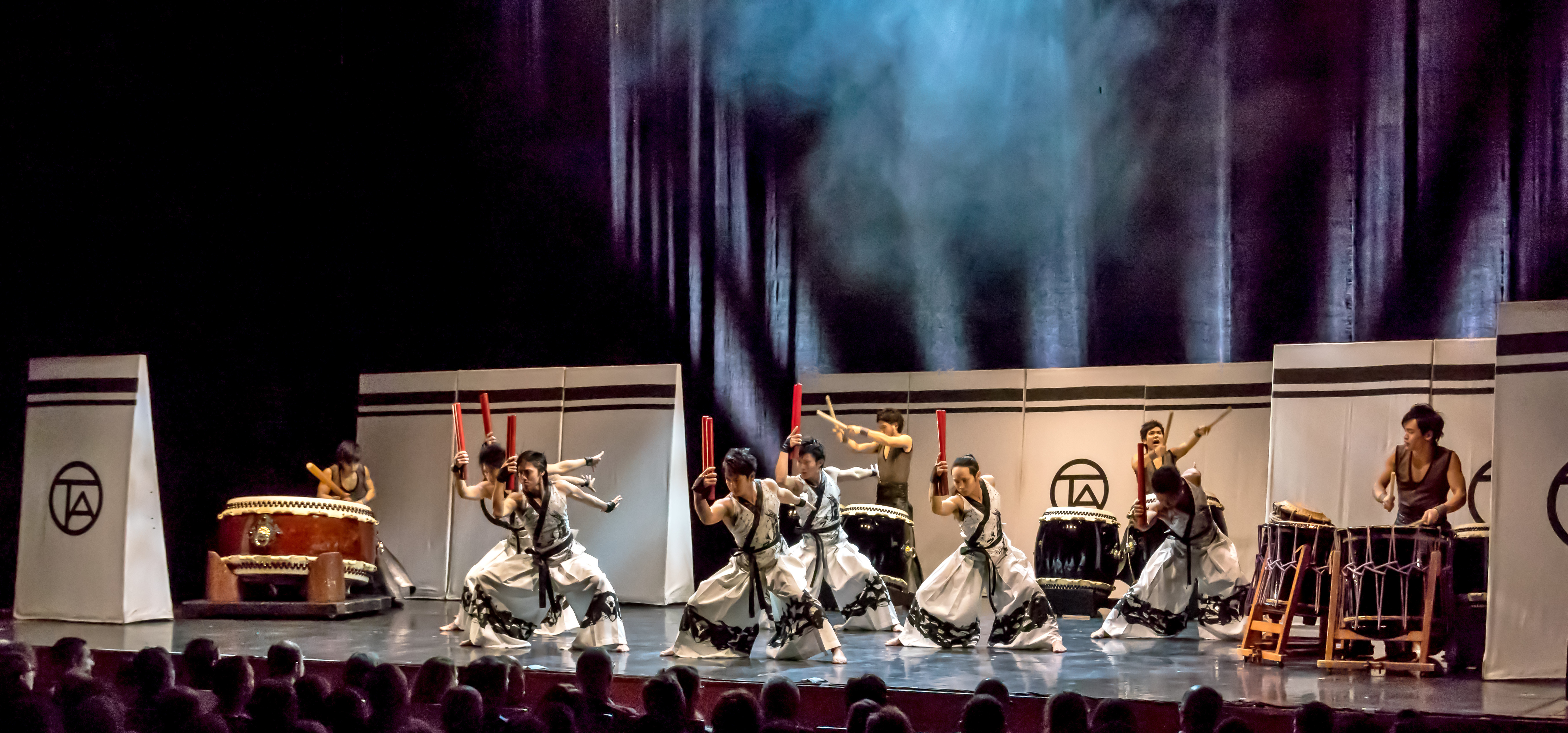 Bilder vom Konzert am 25. Januar 2015 in Freiburg i. Br. TAO - Die Kunst des Trommelns